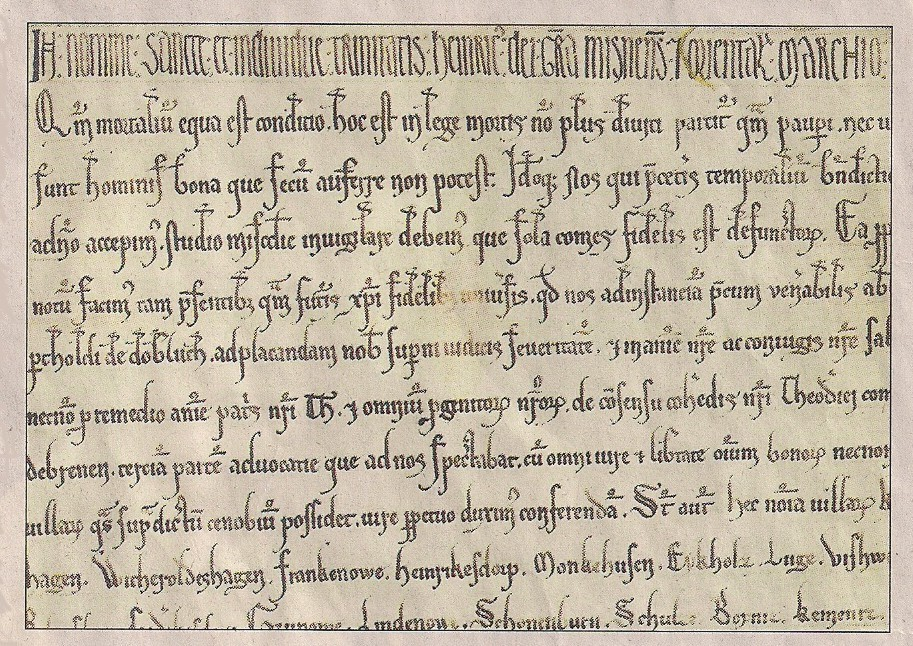 Urkundliche Ersterwähnung von Schonenburn im Jahr 1234 durch Heinrich den Erlauchten